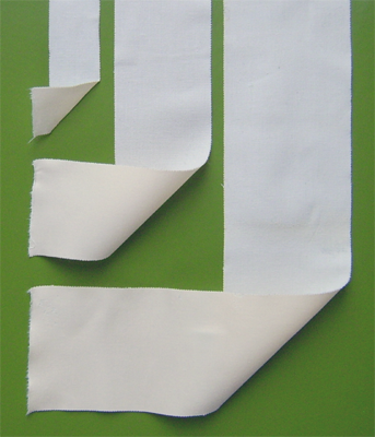 Tapes in verschiedenen üblichen Größen